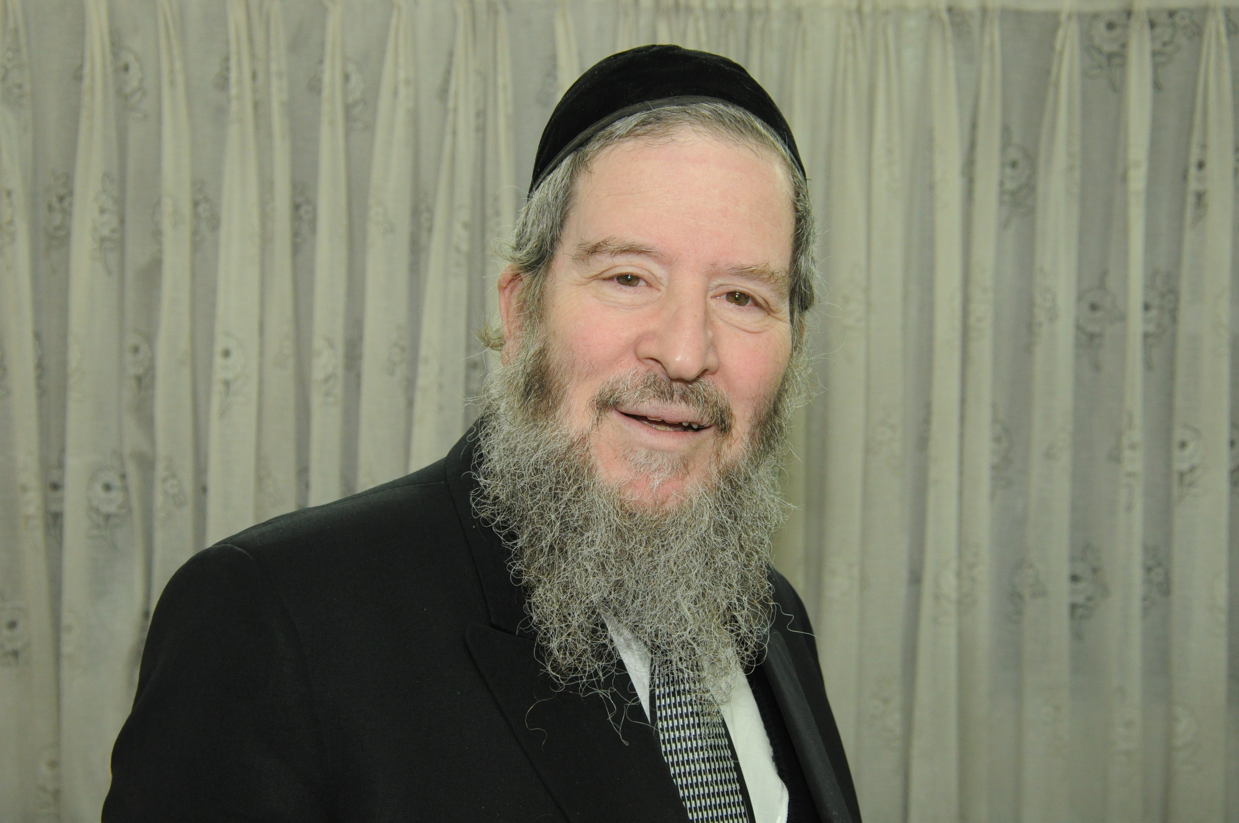 הרב יחזקאל וילנסקי ראש בית המדרש לתורת ארץ ישראל פתח תקווה